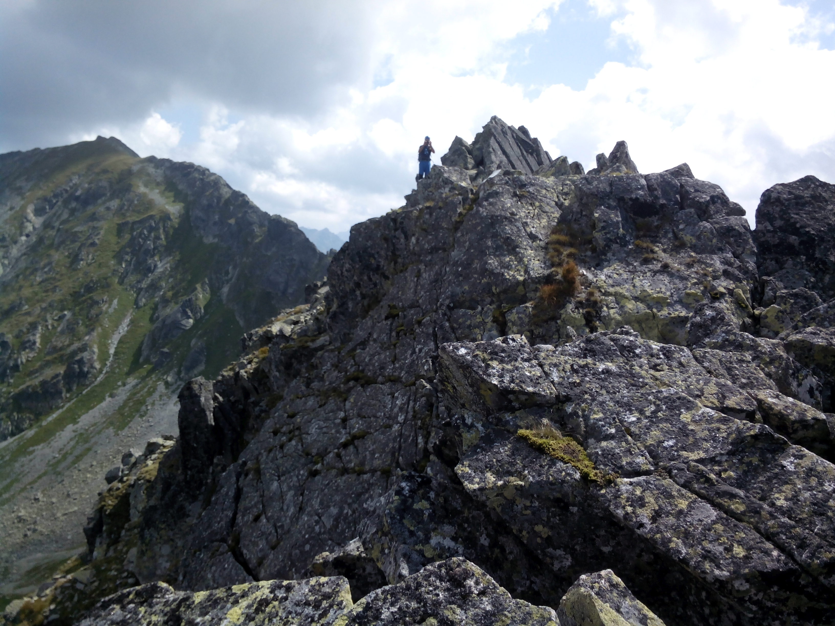 Miedziane, Szpiglasowa Przełęcz i Szpiglasowy Wierch